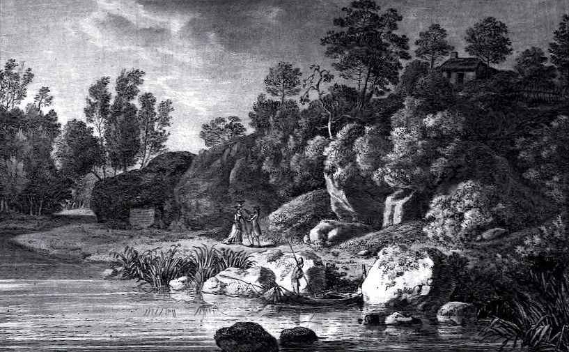 Avec la cabane du philosophe, ce monument était la principale fabrique du Désert, où la nature régnait en maîtresse.